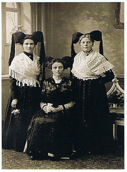 Markgrefler Frauedracht z Obfige mit dr Markgrefler Hernerchappe um 1905. D Dracht vu dr ghyrotene Frau het e schwarz Firduech, d Dracht vu dr ledige Fraue ne wys Firduech.